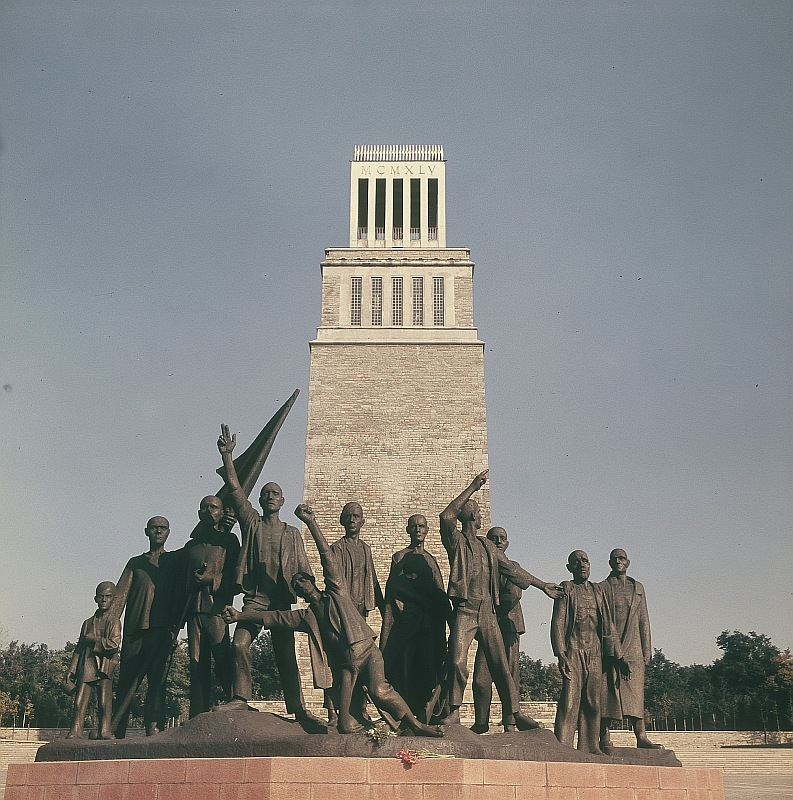 Original image description from the Deutsche FotothekWeimar. Buchenwald-Denkmal von Fritz Cremer